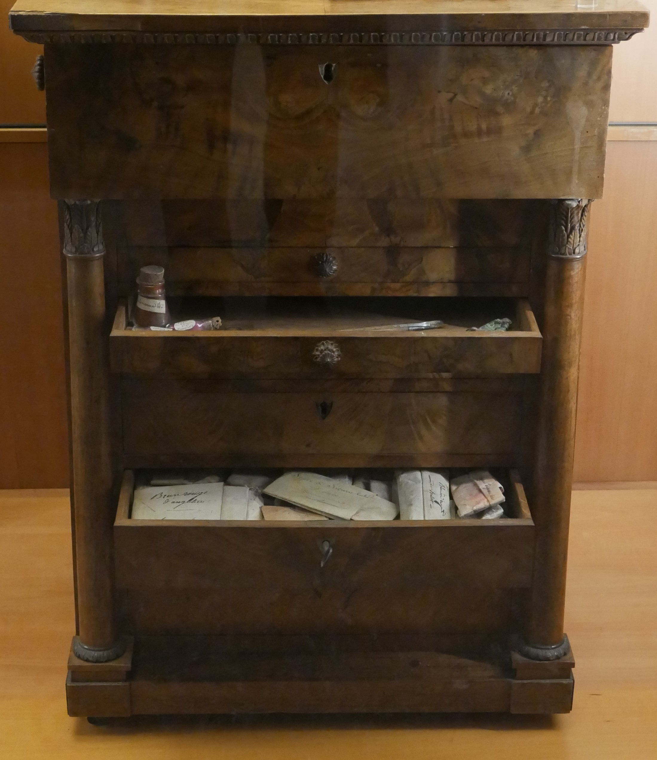 Bois, placage d'acajou Achat auprès de la famille de l’artiste avec le concours du Fond Régional pour l’Acquisition des Musées (FRAM) Inv.1988-4-1-2